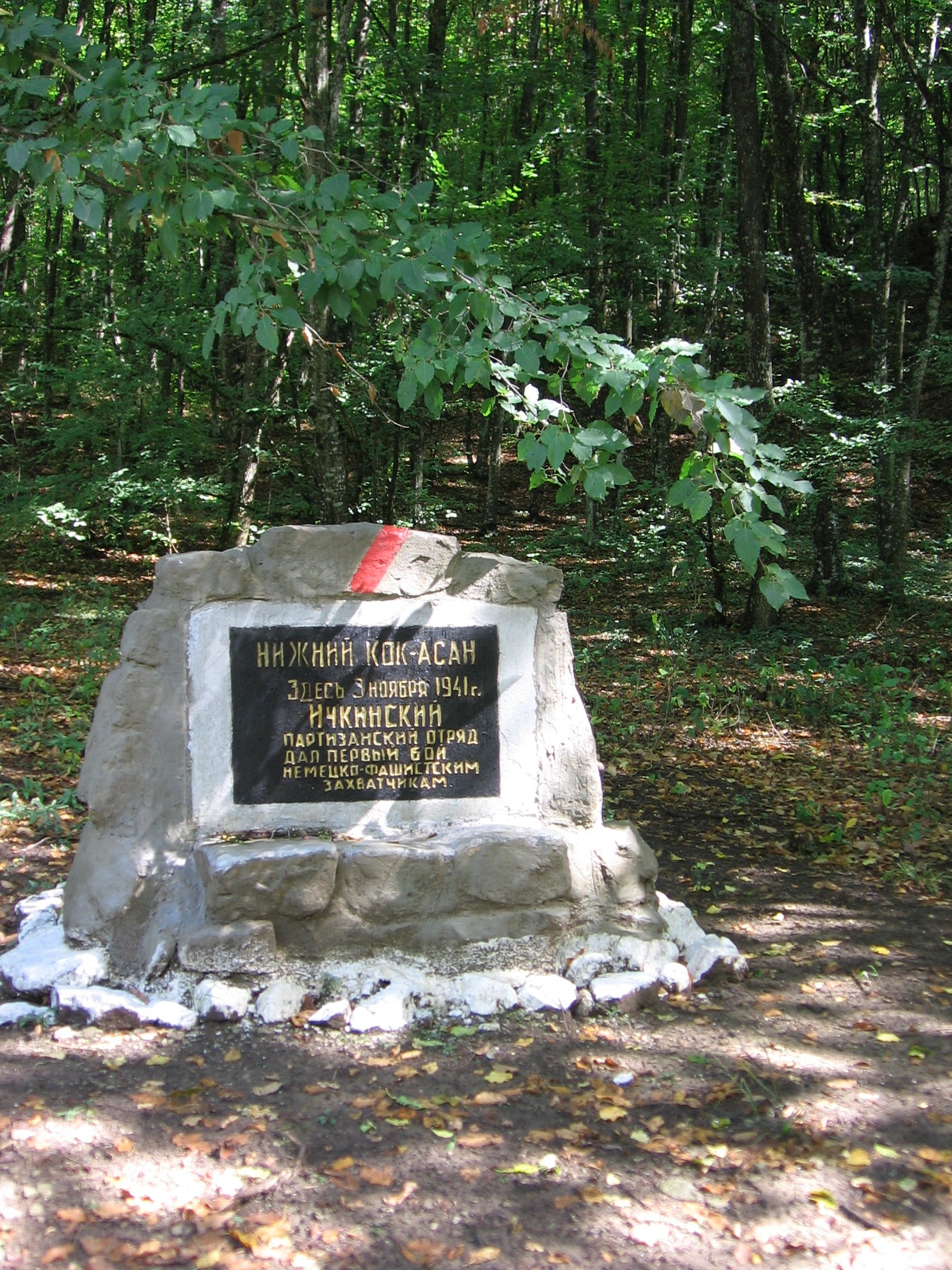 Кок-Асан, партизанский памятный знак, Крым